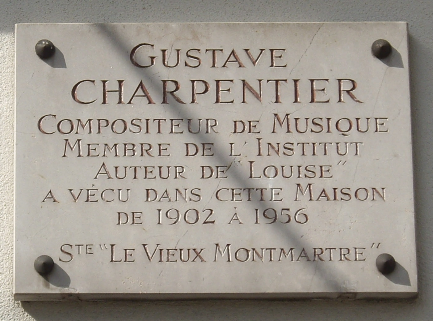 Plaque commémorative, 66 boulevard de Rochechouart, Paris 18e. « Gustave Charpentier, compositeur de musique, membre de l'Institut, auteur de Louise, a vécu dans cette maison de 1902 à 1956. Société Le Vieux Montmarte. »